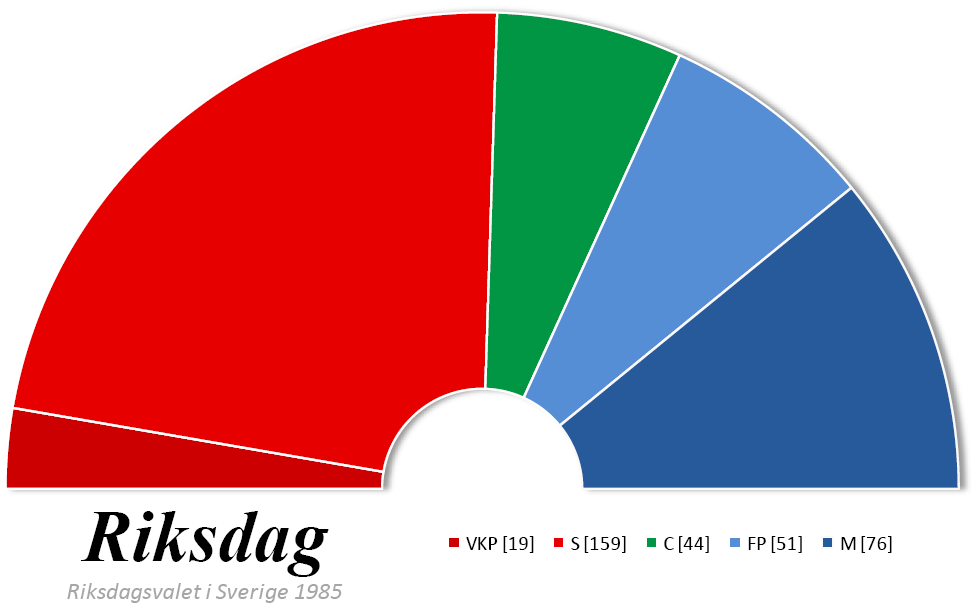 Composition du Riksdag suédois après les élections générales de 1985